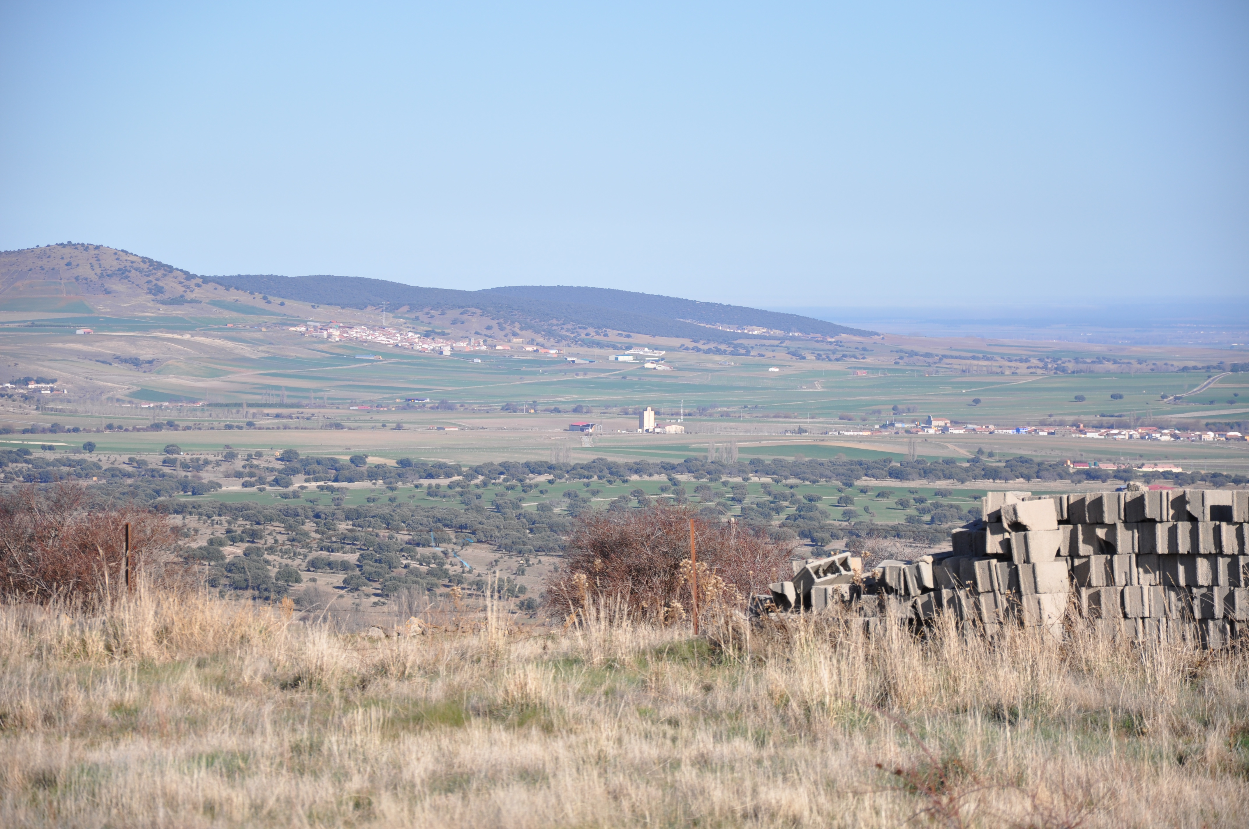 Solana de Rioalmar y Múñico desde Manjabálago, Ávila, España.